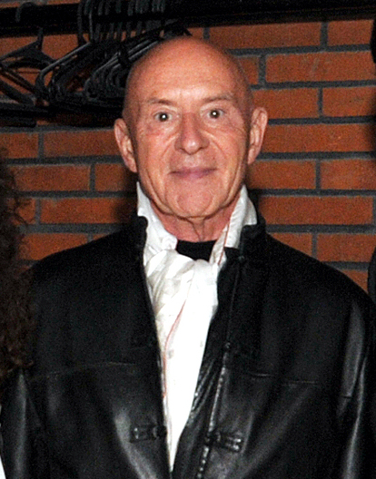 FOTO: Consejera Adjunta de Asuntos Culturales, Carissa Gonzàlez, Horacio Rosemblum, amigo personal de la embajadora; Julissa Reynoso, embajadora de Estados Unidos; el Maestro Christoph Eschenbach y el Cellista Claudio Bohórquez. En el marco del 70 aniversario del Centro Cultural de Música, la Orquesta Sinfónica de Washington (EE.UU.) se presentó en el Auditorio Nacional Adela Reta (Sodre) en un evento que contó con el auspicio de la Embajada de Estados Unidos en Uruguay. La embajadora, Julissa Reynoso, asistió al concierto y tuvo la oportunidad, al finalizar el mismo de conocer personalmente al Director de la Orquesta, el Maestro Christoph Eschenbach y al célebre cellista Claudio Bohórquqez, quien actuó como solista en el concierto. El auspicio de la embajada para este evento forma parte de la iniciativa "Un mes de música estadounidense" que la embajada está celebrando en los meses de junio y julio y a través del cual presenta músicos estadounidenses en diversos escenarios y eventos del Uruguay. Más acerca del Mes de la Música Estadounidense en U.S. Embassy photo: Pablo Castro / Copyright info